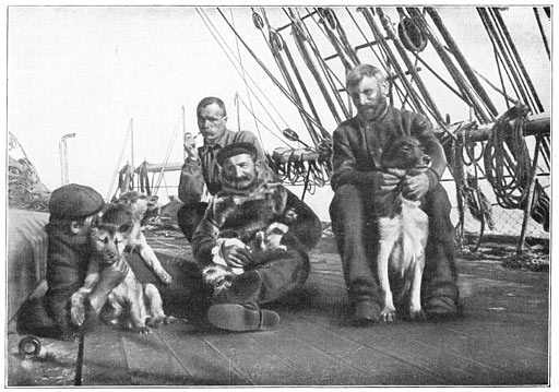 Aan de Zuidpool